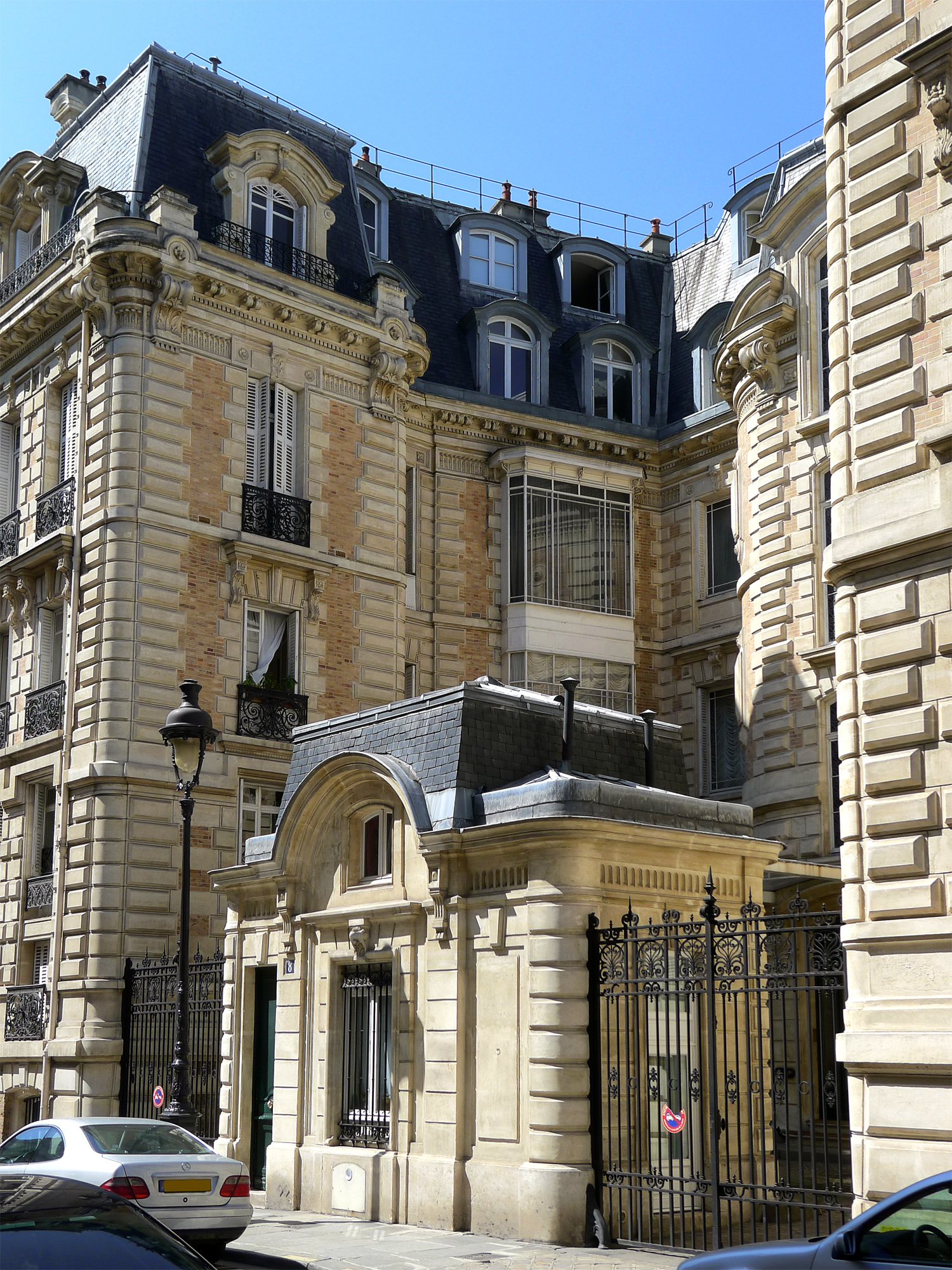 Rue Murillo (n° 8) - Paris VIII